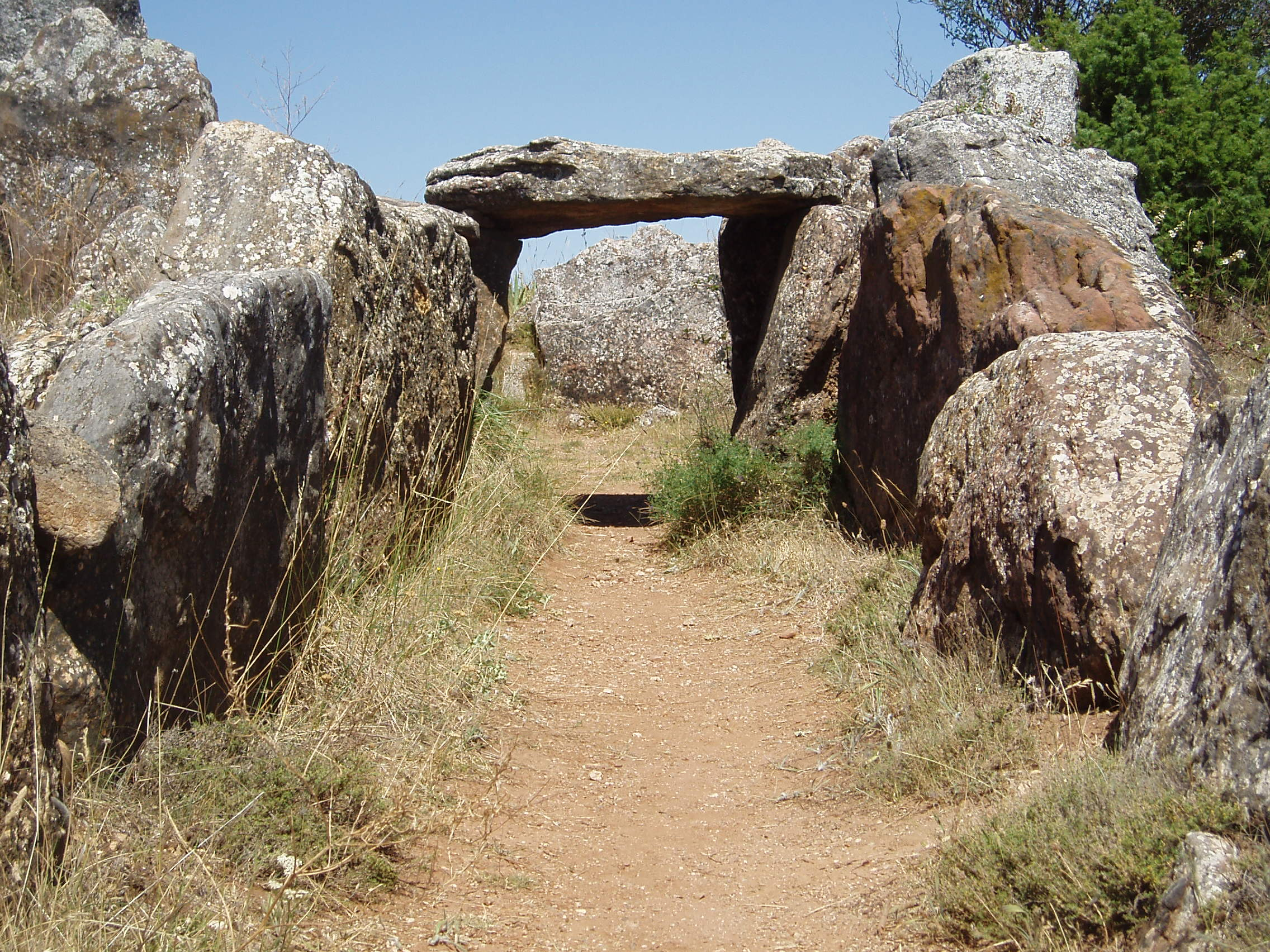 Dolmen de Cubillejo de Lara desde el corredor, en 2009.